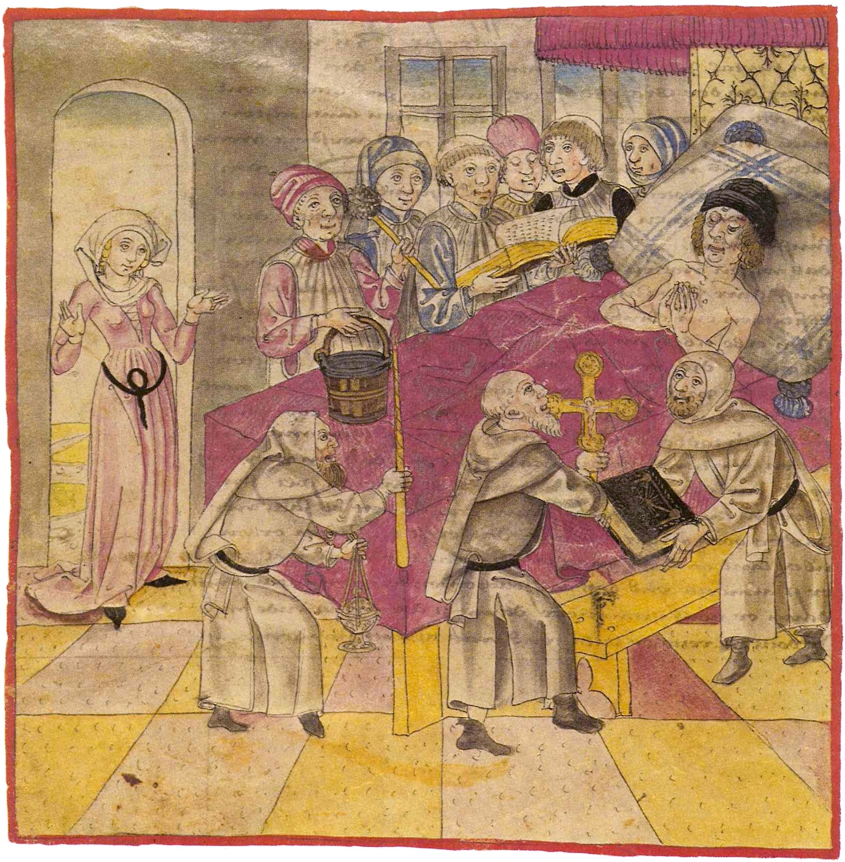 Graf Friedrich VII. von Toggenburg auf dem Totenbett auf der Schattenburg in Feldkirch, 1436